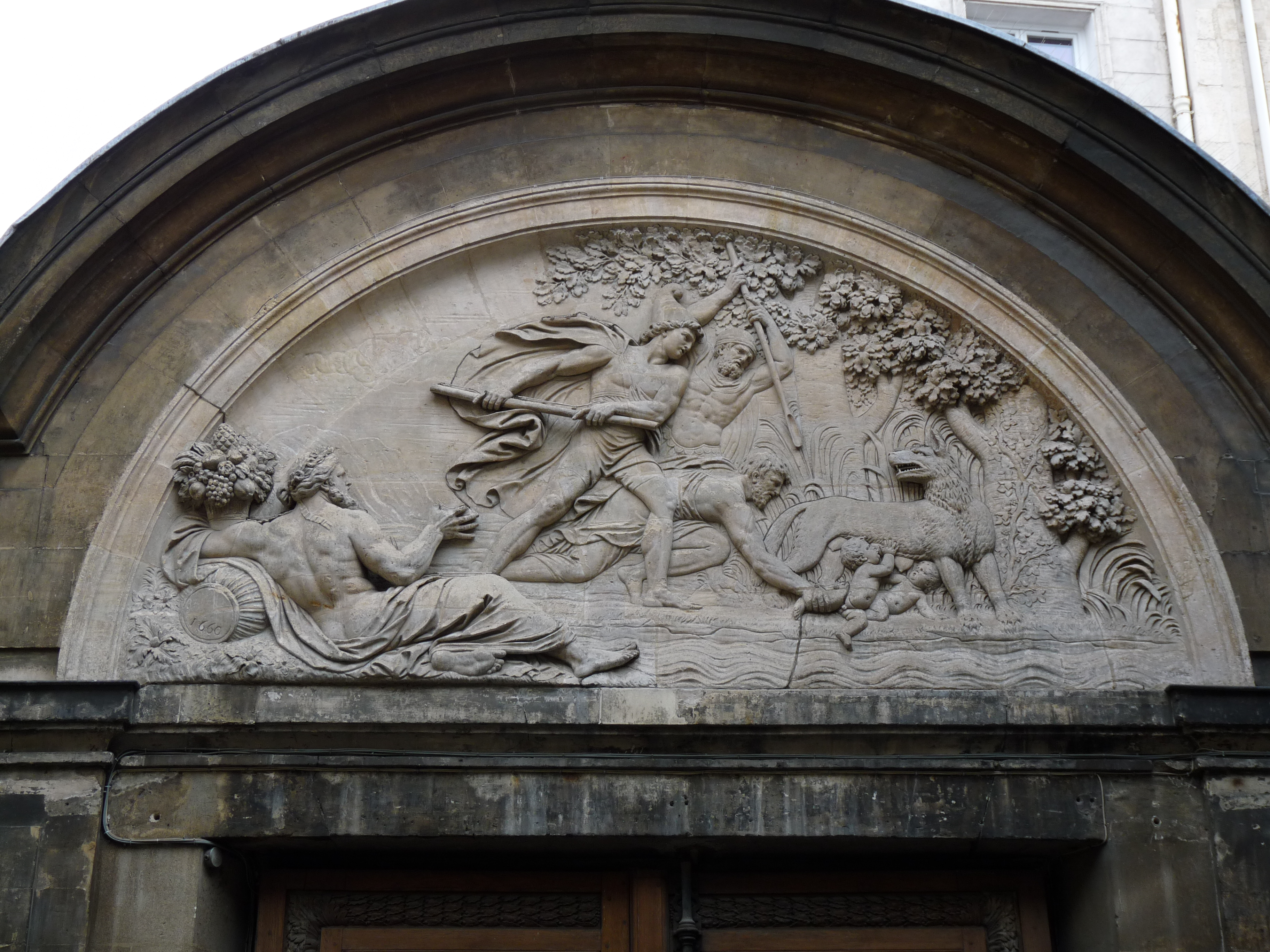 L'hôtel Amelot de Bisseuil, dit des Ambassadeurs de Hollande, à Paris. Portail, vu de la première cours.